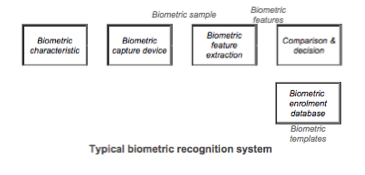 Fases del reconeixement